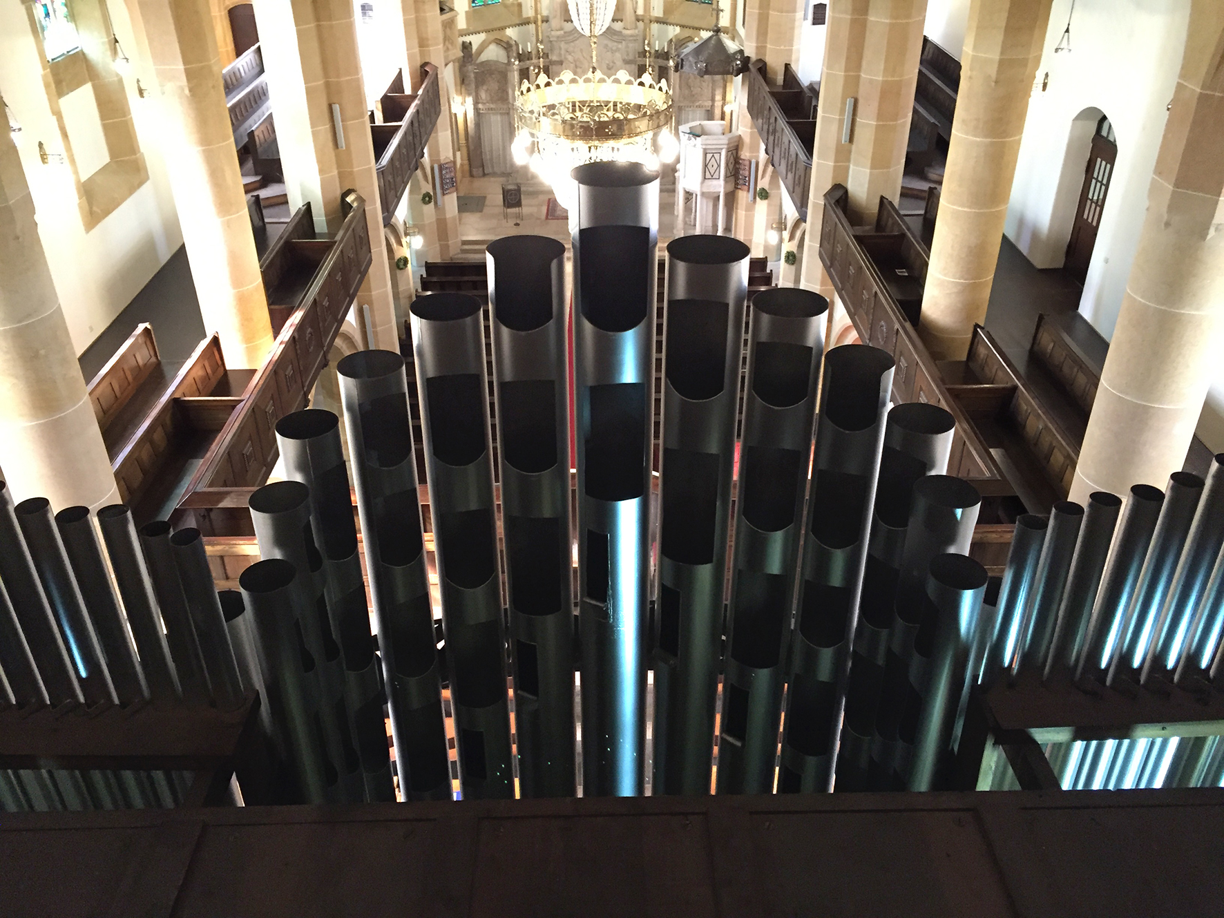 Prospektpfeifen der Strebel-Orgel vom „Dach” des Schwellwerks aus gesehen